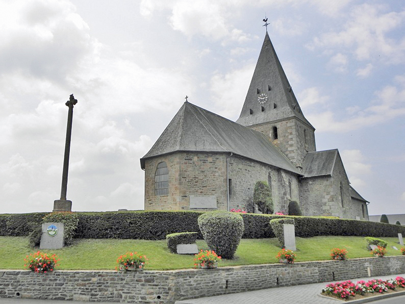 L'église paroissiale de La Croix-Avranchin (50).